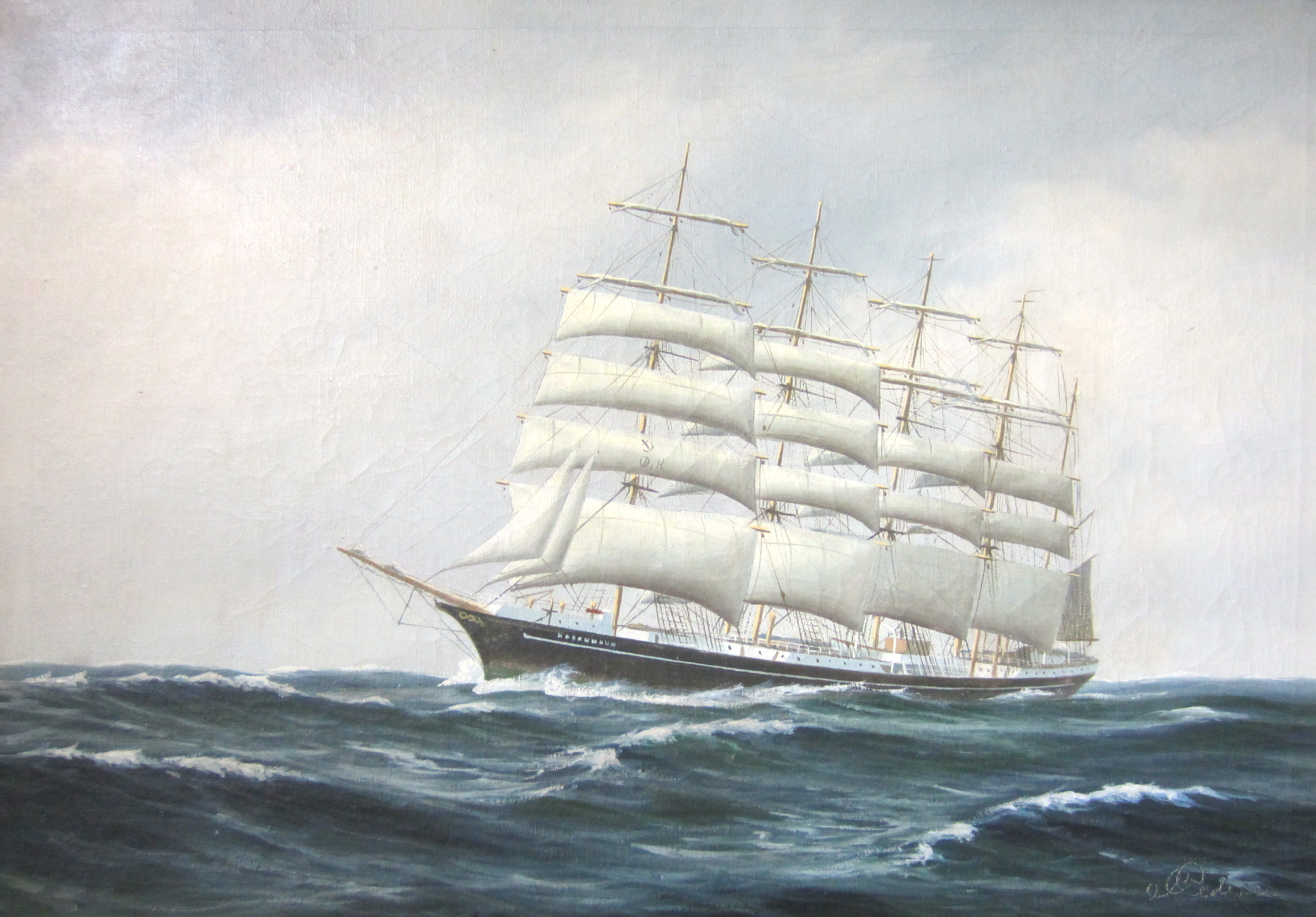 Skolfartyget København, som var en femmastad bark, byggdes i Leith i Skottland och sjösattes den 24 mars 1921. Hon mätte 120 meter i längd, 15 meter i bredd och hade ett djupgåenden på 9 meter. Masthöjden var 56,7 meter över däcket. Fartygets segel kunde totalt uppgå till 4.646 kvm. Hennes jungfrutur gick den 30 september 1921 till just Köpenhamn. Beställare var Det Ostasiatiska Kompaniet i Danmark. Under en resa från Buenos Aires den 14 december 1928 till Australien gick fartyget under med 59 man ombord. Sista radiokontakten med fartyget var den 22 december 1928. Sjöförklaringen ägde rum den 15 oktober 1929. Det hade då inte påträffats några spår efter fartyget.